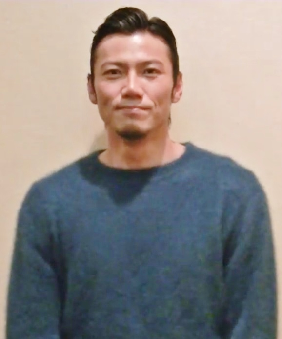 岩永洋昭（「映画刀剣乱舞」より日本号役）